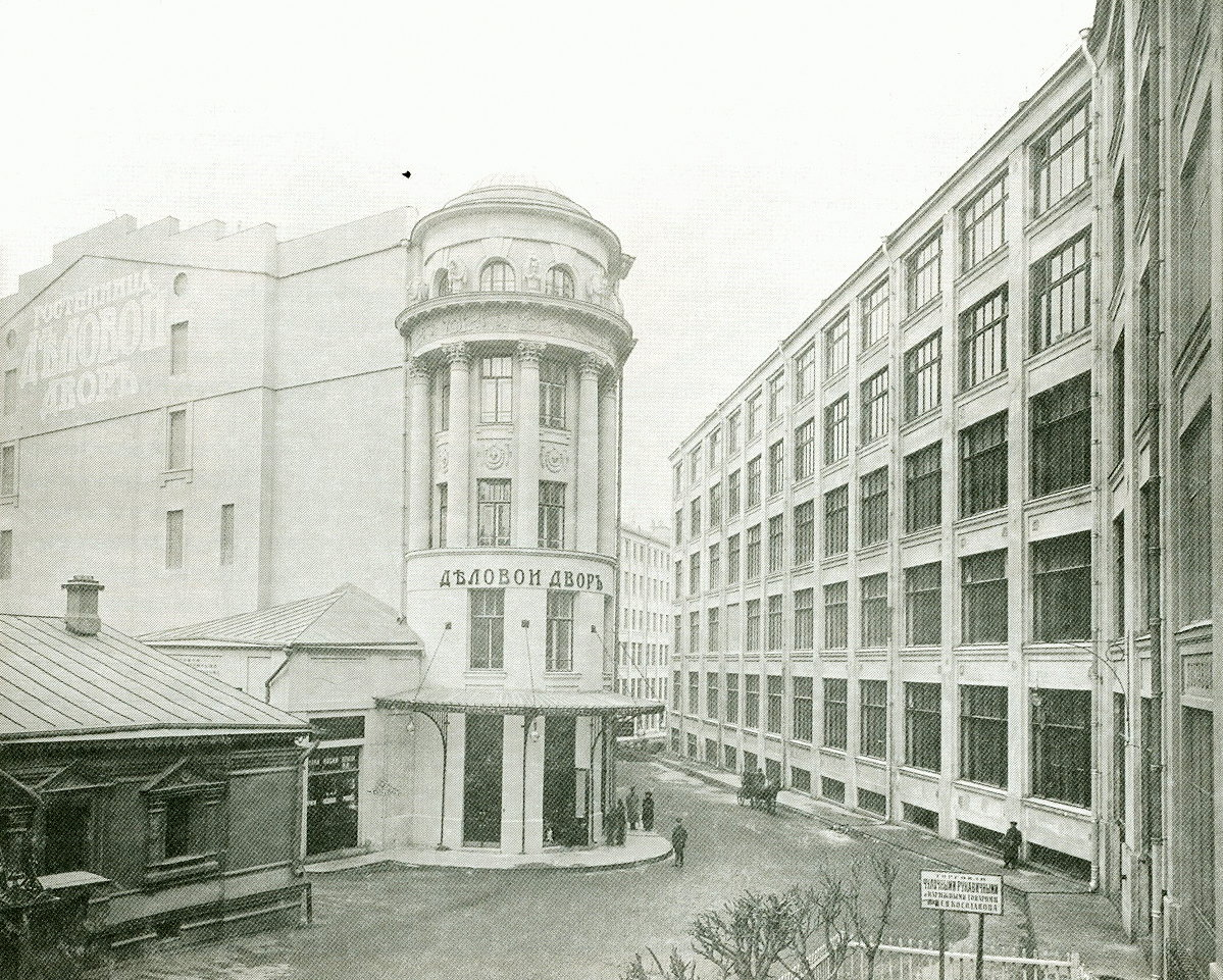 Здание "Делового двора" у церкви Всех Святых. Фот. 1913 года. РГИА.